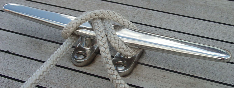 Klampe 3